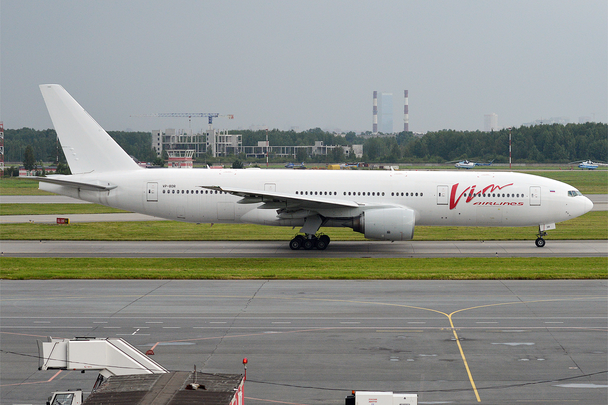 VIM Airlines, VP-BDR, Boeing 777-212 ER